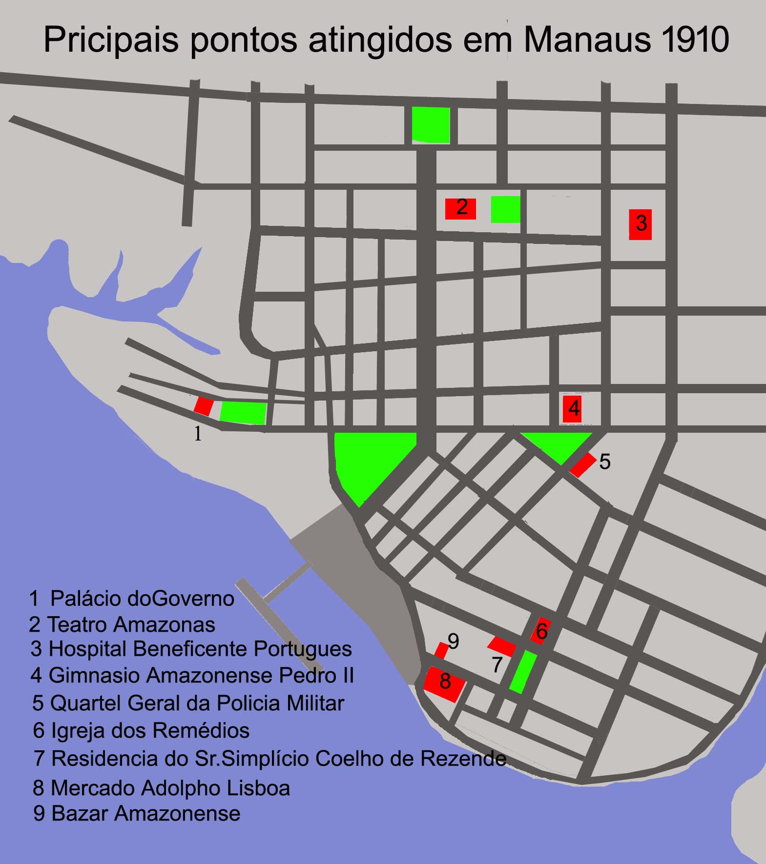 principais pontos atingidos no bombardeio de 1910